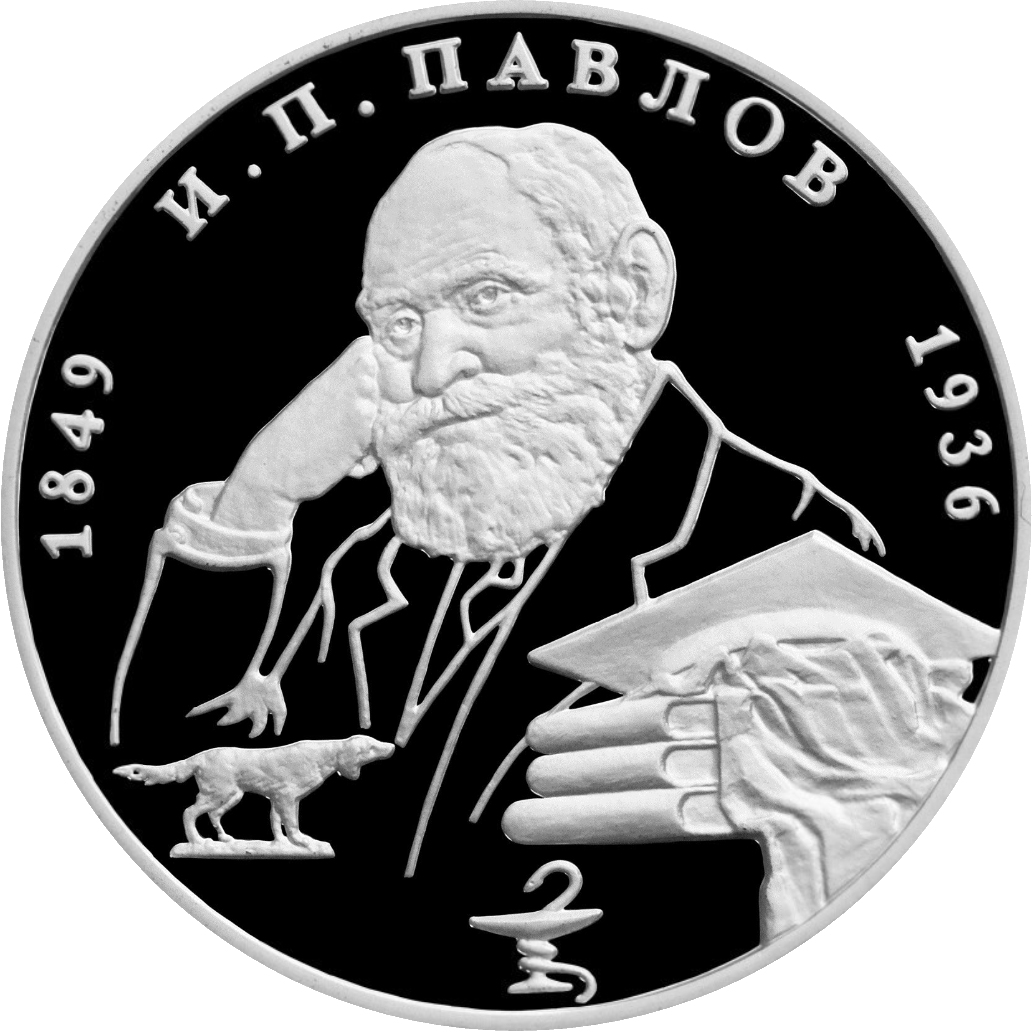 Монета Банка России — Серия: «Выдающиеся личности России», 150-летие со дня рождения И.П. Павлова (1), 2 рубля, реверс. Серебро 925 пробы.